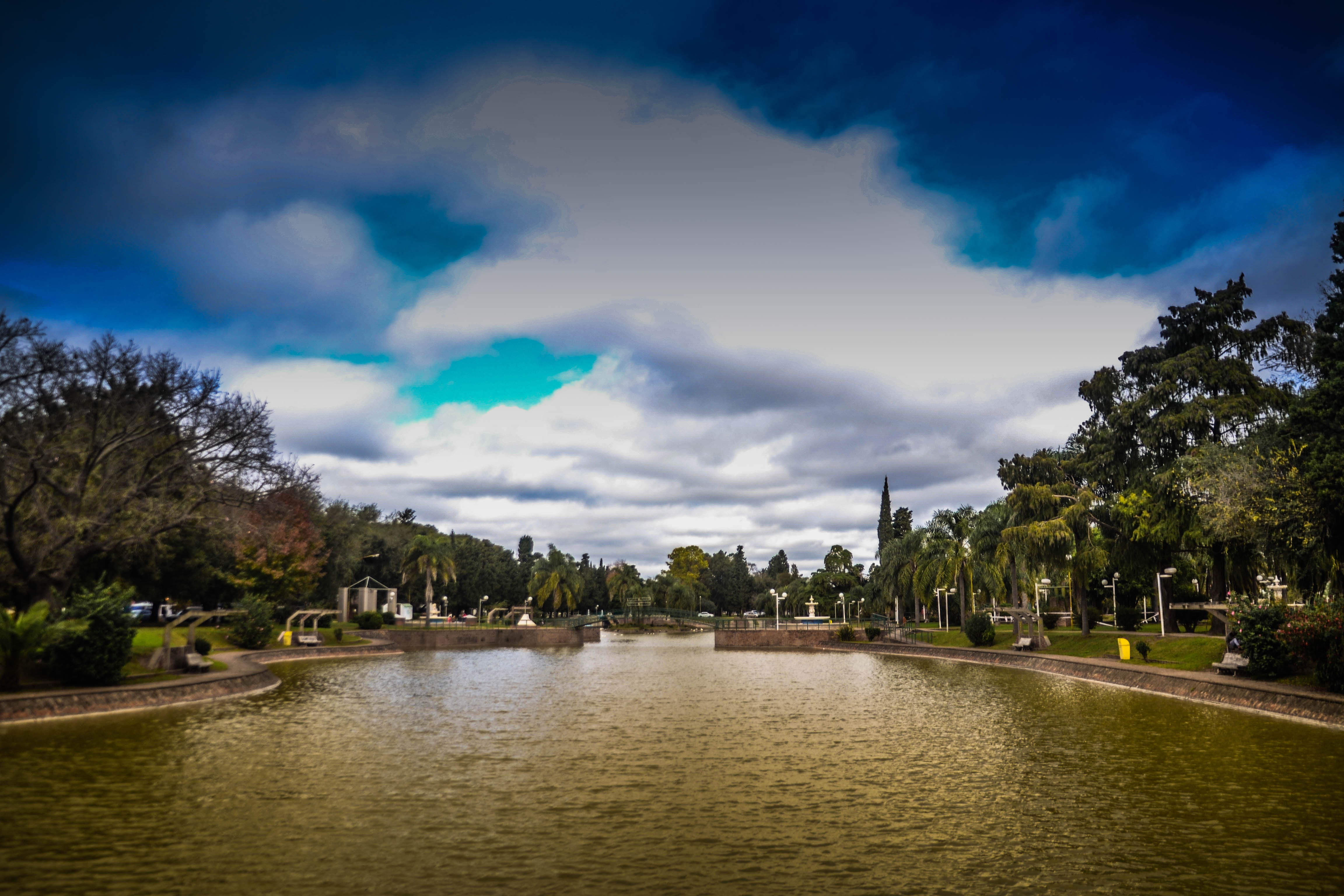 Parque Nacional de la Agricultura - Esperanza (Santa Fe)